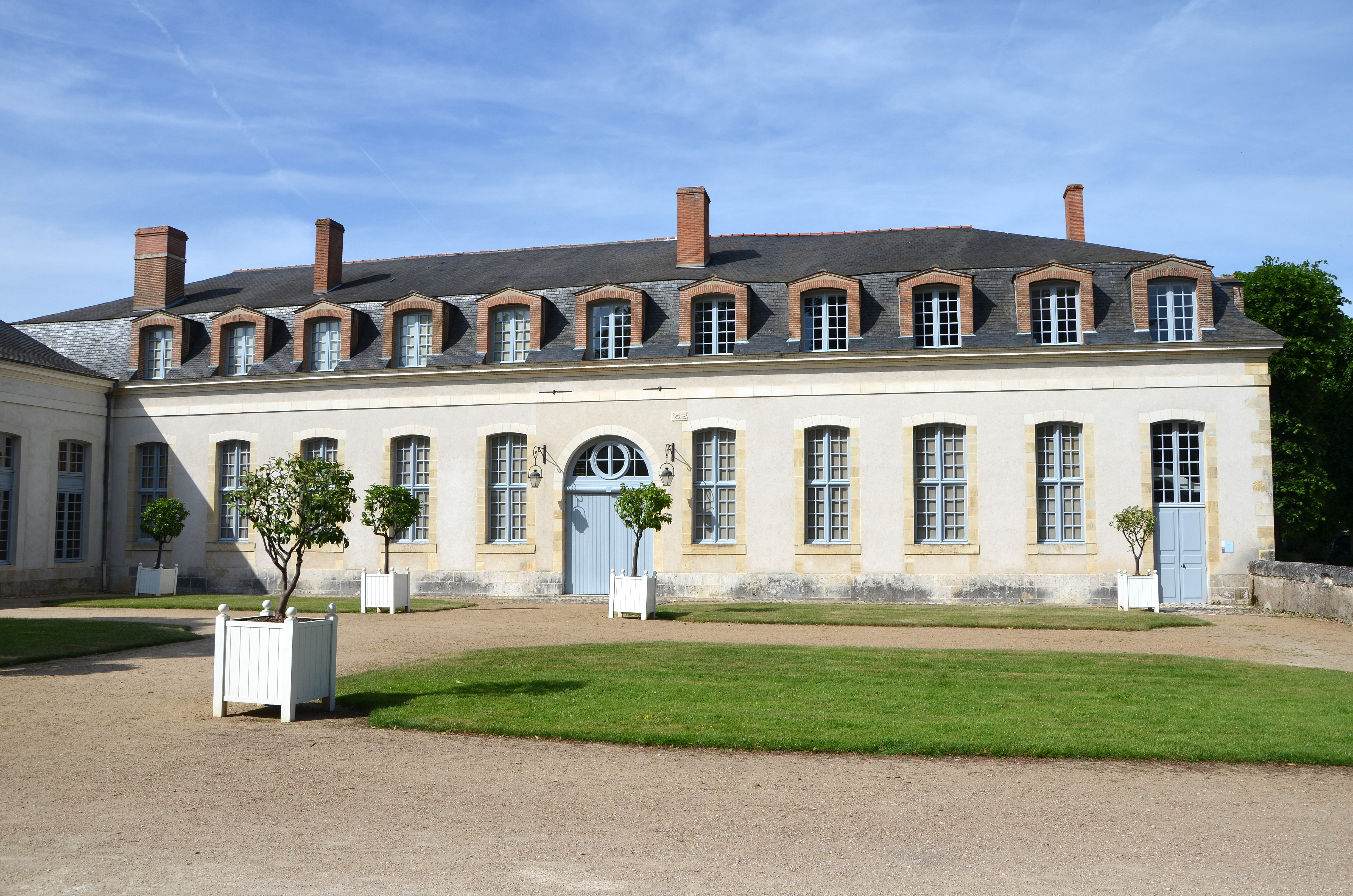 Annexe du Château de Châteauneuf-sur-Loire, Loiret, France